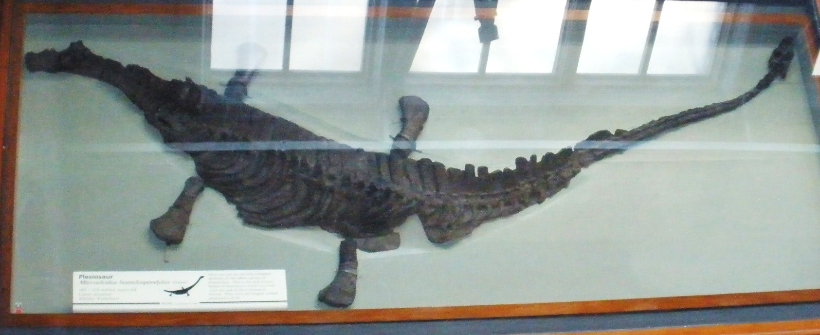 Fossil of Microcleidus, an extinct reptile-- Took the photo at Natural History Museum, London